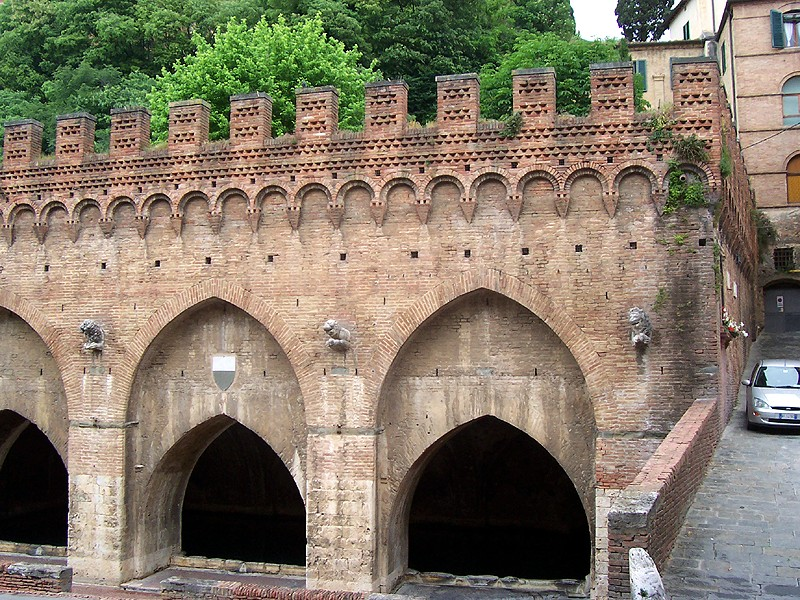 Siena - Fonte Branda